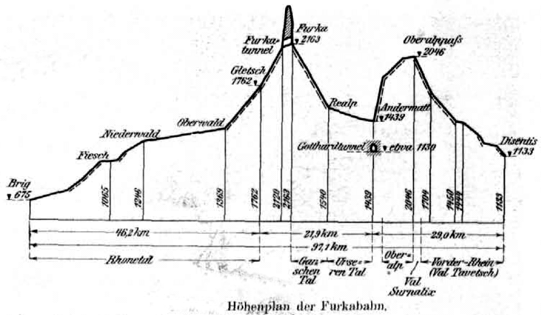 Höhenplan der Furkabahn